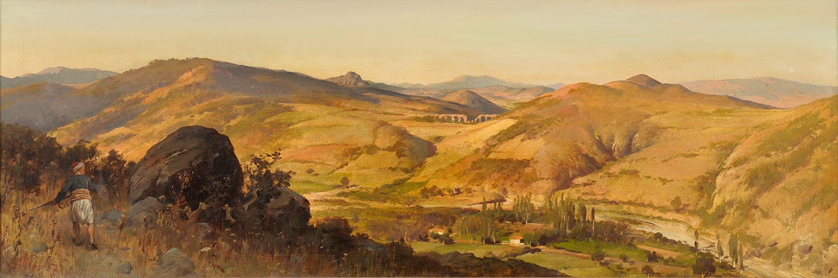 Landschaft auf Zypern mit Jäger. Signiert. Datiert (18) 87. Öl auf Leinwand auf Holz, 52 x 154 cm